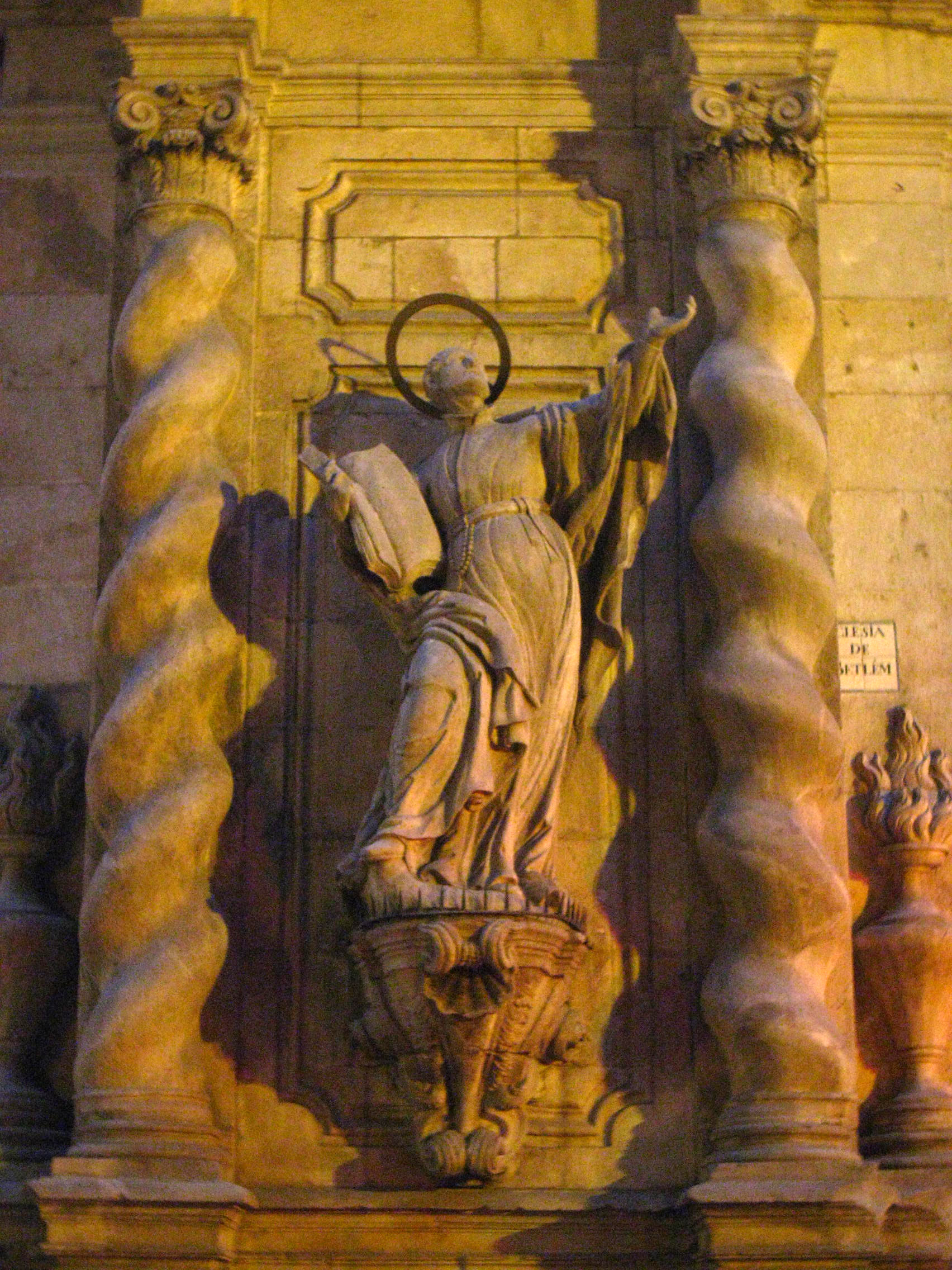 Església de Betlem (Barcelona)